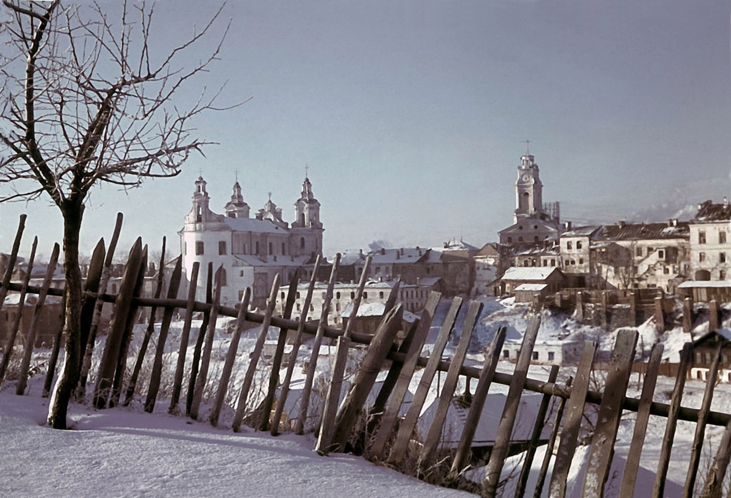 Беларуская (тарашкевіца): Віцебск (Viciebsk), панарама з Кстоўскай гары (Kstoŭskaja hara)